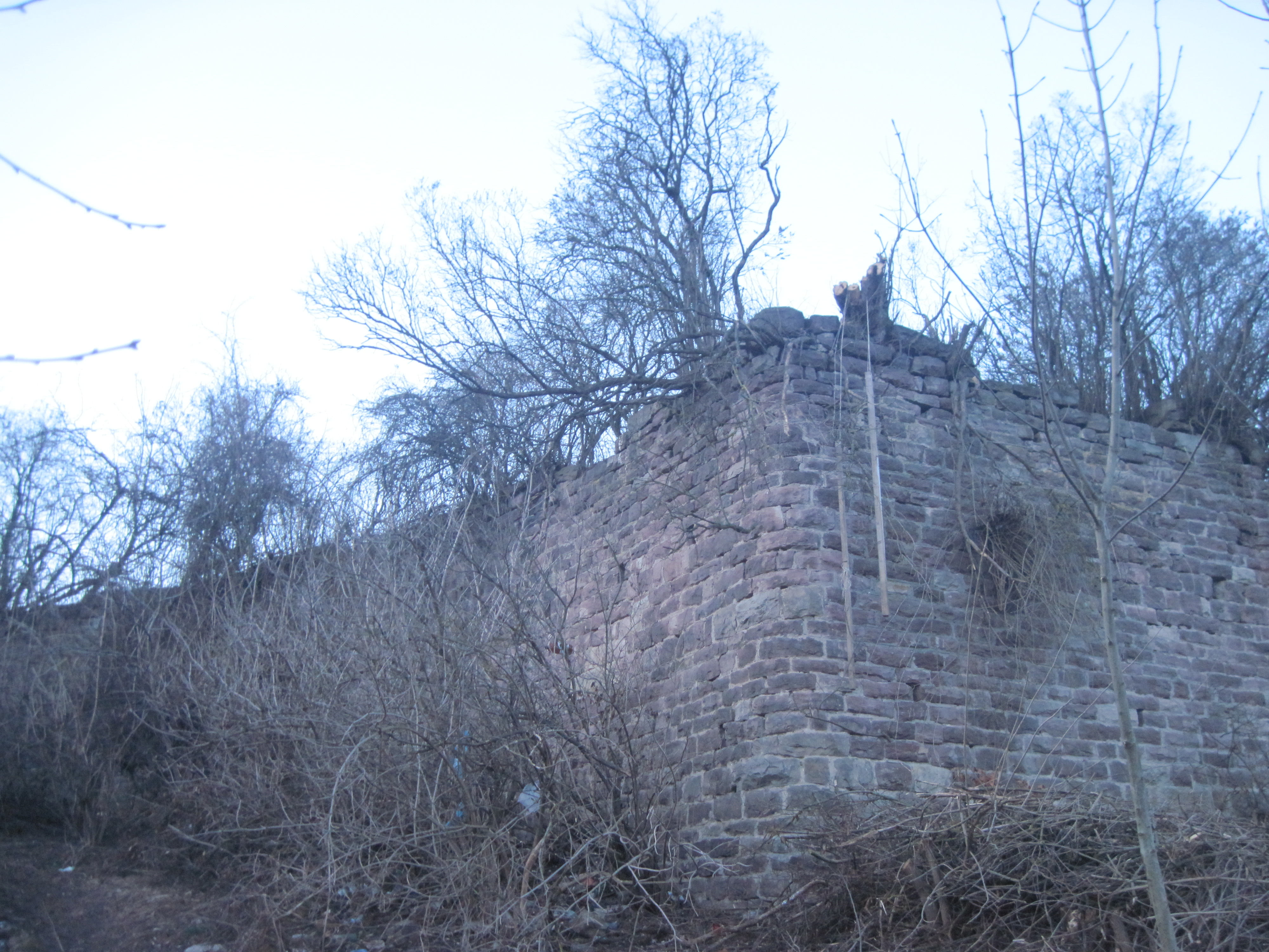 Підпірна стіна школи на Бараках. Бучач, 2015